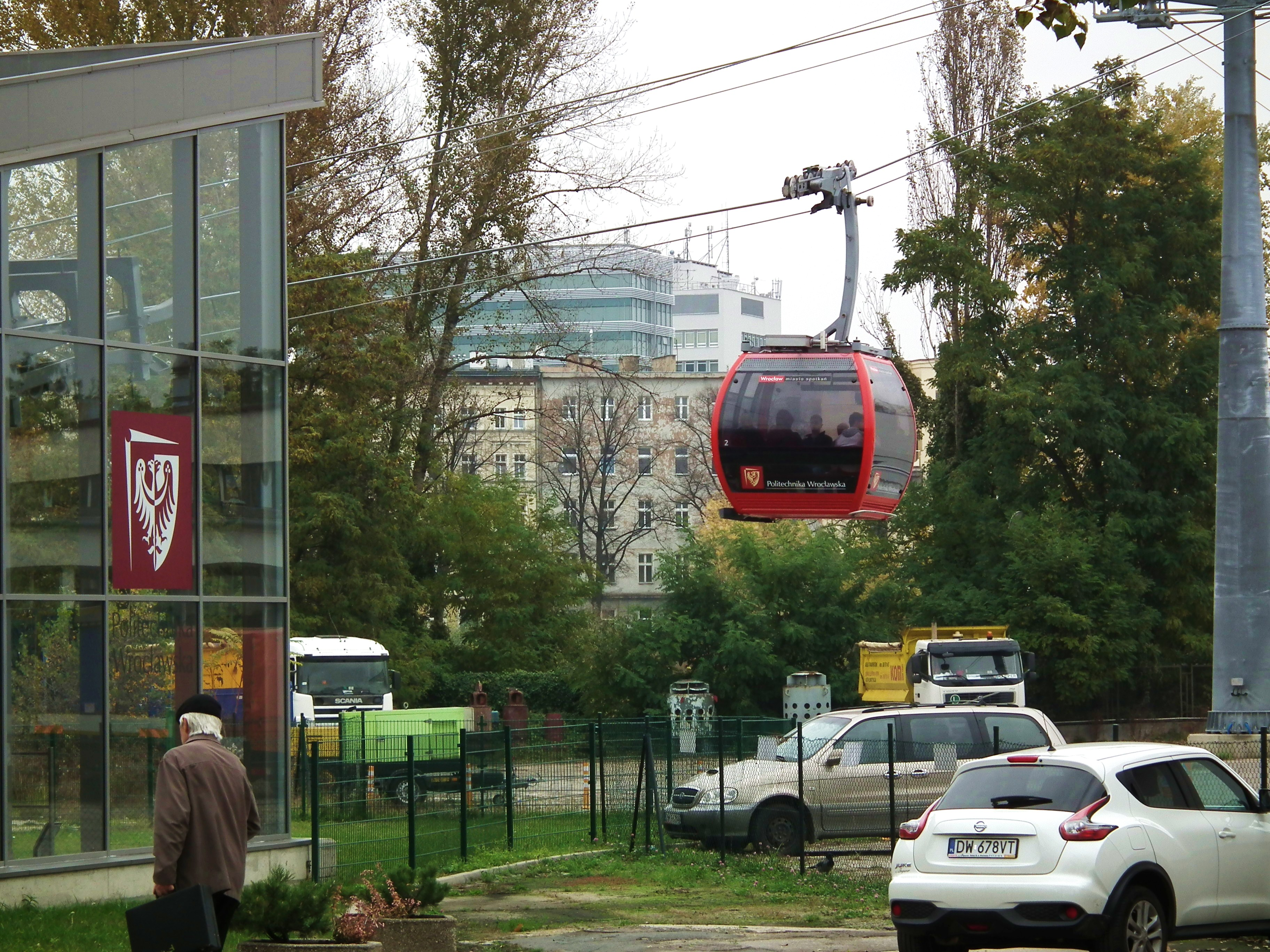 Kolej gondolowa Polinka we Wrocławiu.